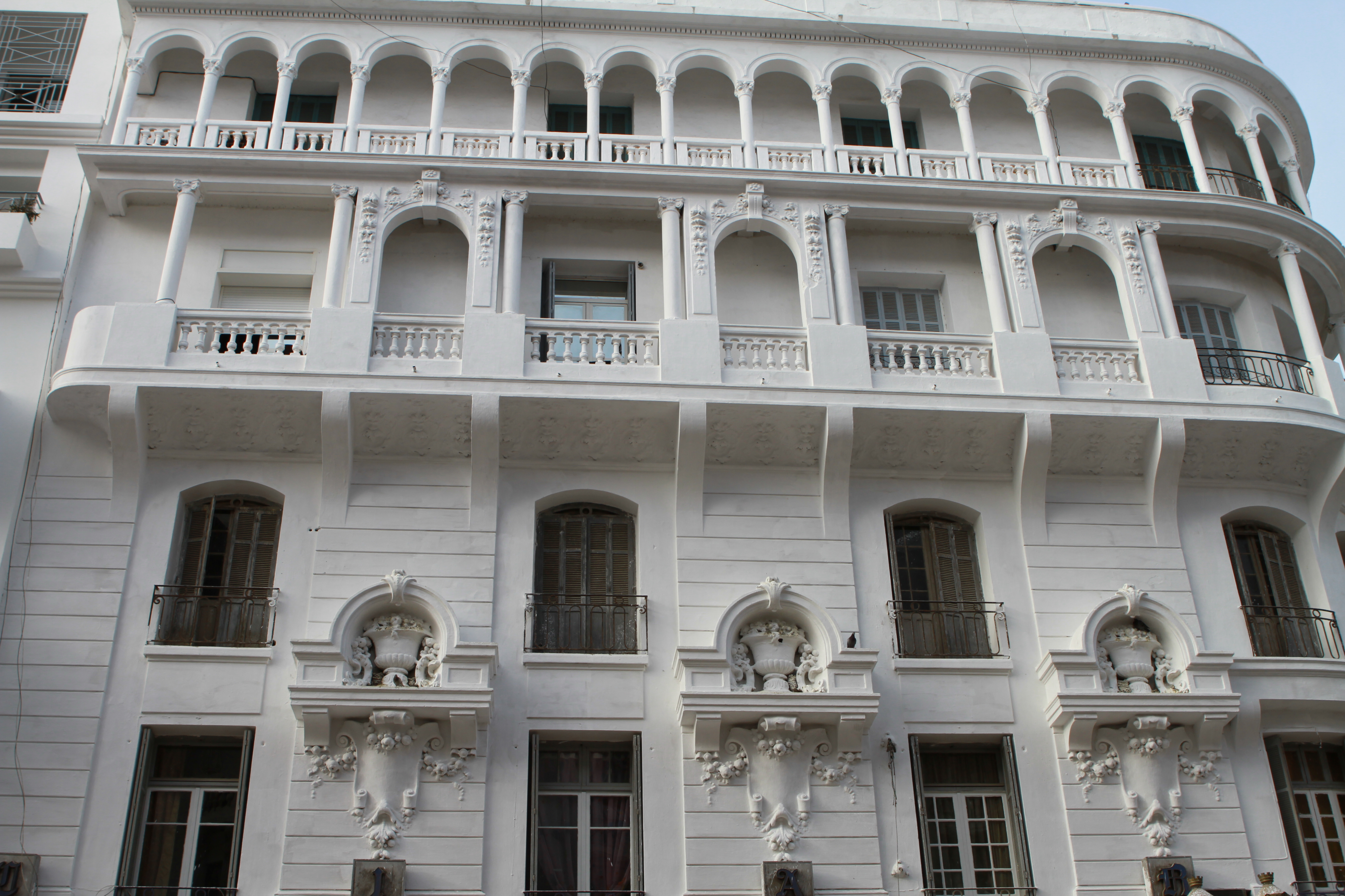 Immeuble Art Déco Boulevard Mohhamed V Casablanca